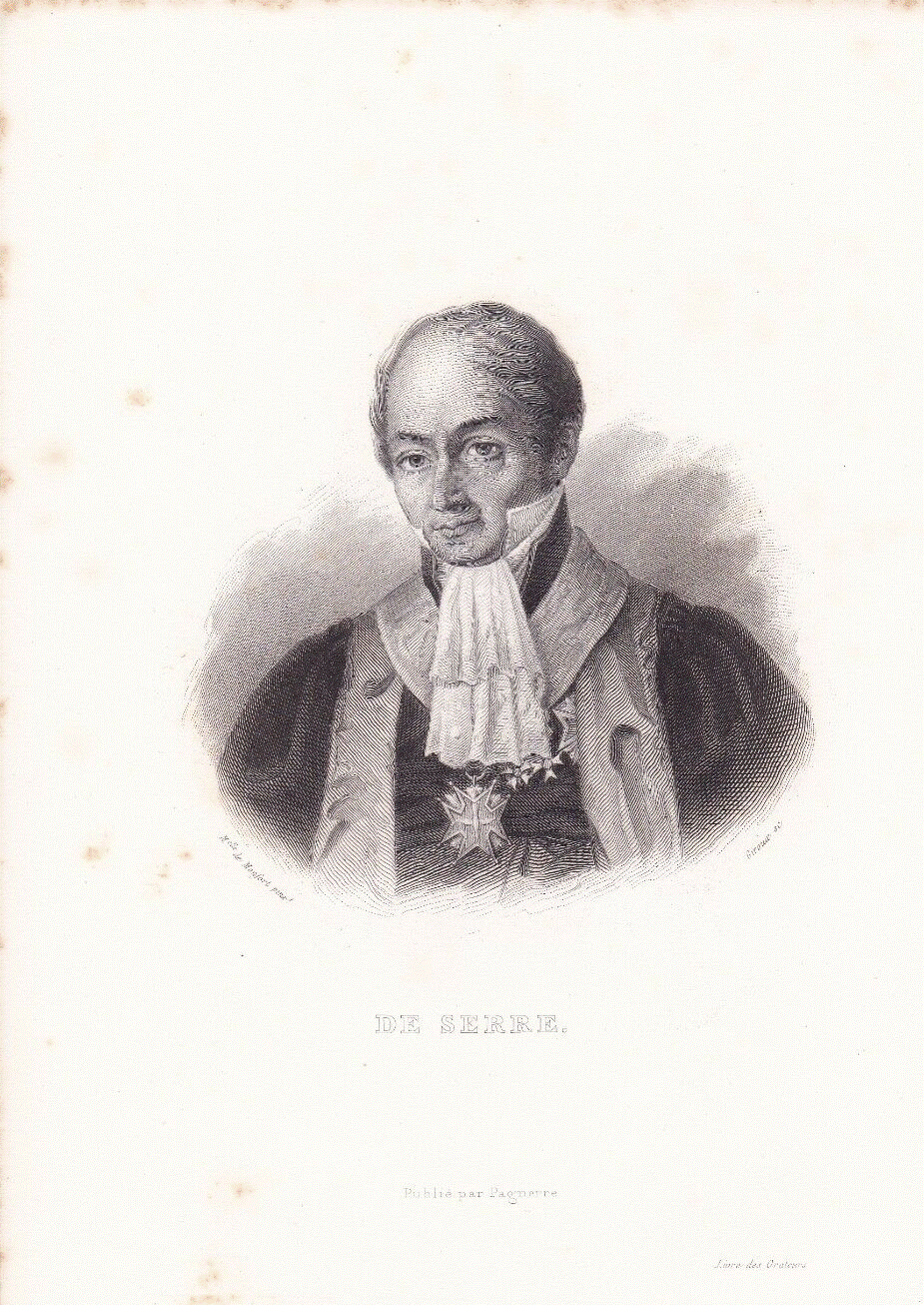 Le comte de Serre. Gravure de Girouac, publiée par Pagnerre, d'après un portrait peint ou dessiné par Mademoiselle de Monfort. Extrait du Livre des Orateurs de Louis Marie de la Haye, vicomte de Cormenin, 1842.